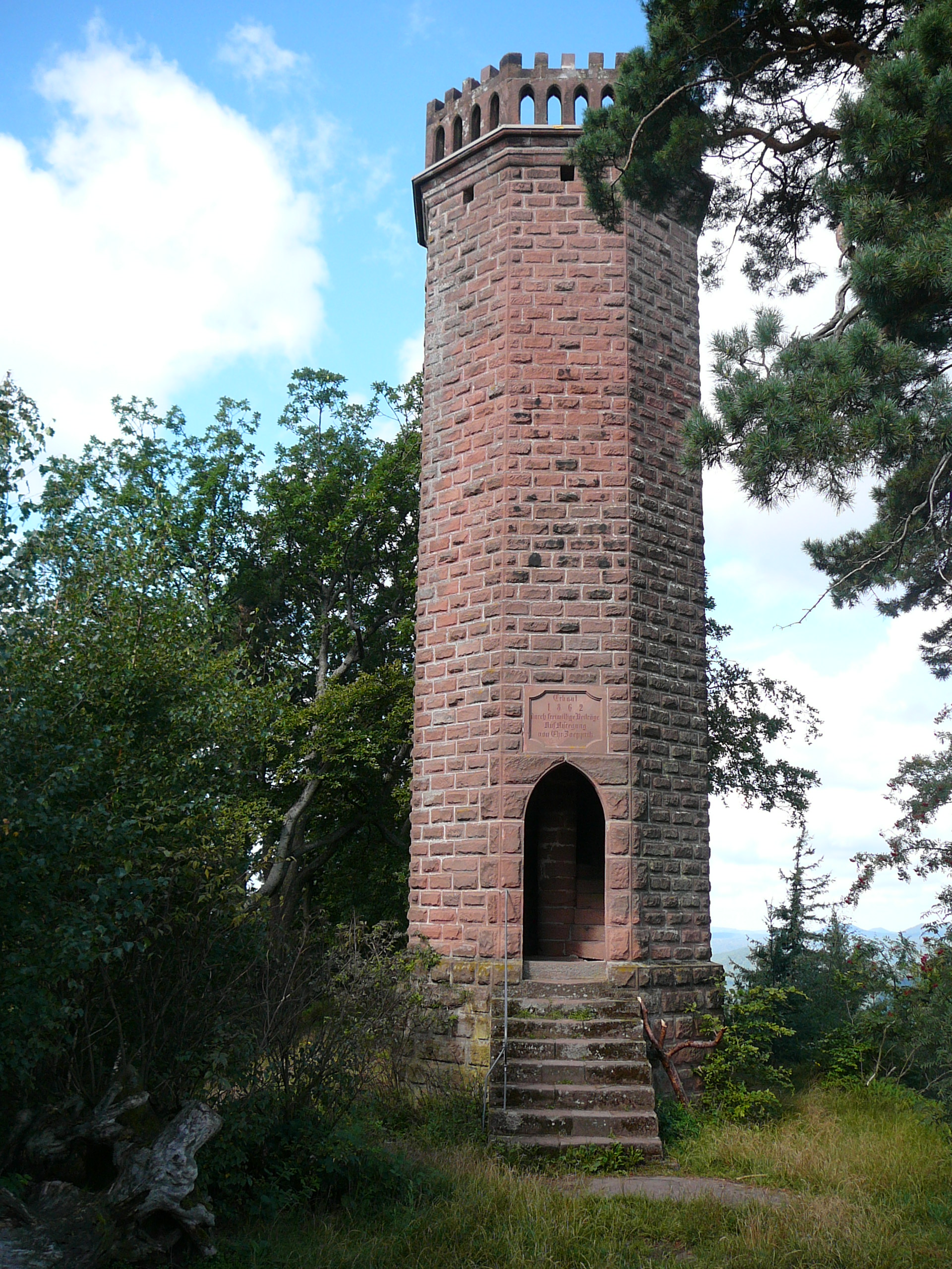 Aussichtsturm auf dem Rehberg (Höhe 14m)